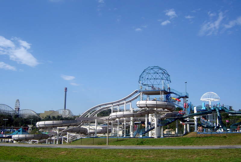 Parque Wet 'n Wild em Valinhos, São Paulo, Brasil.